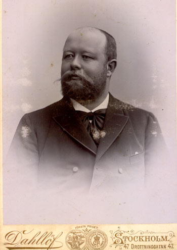 Johan Richard Edblom